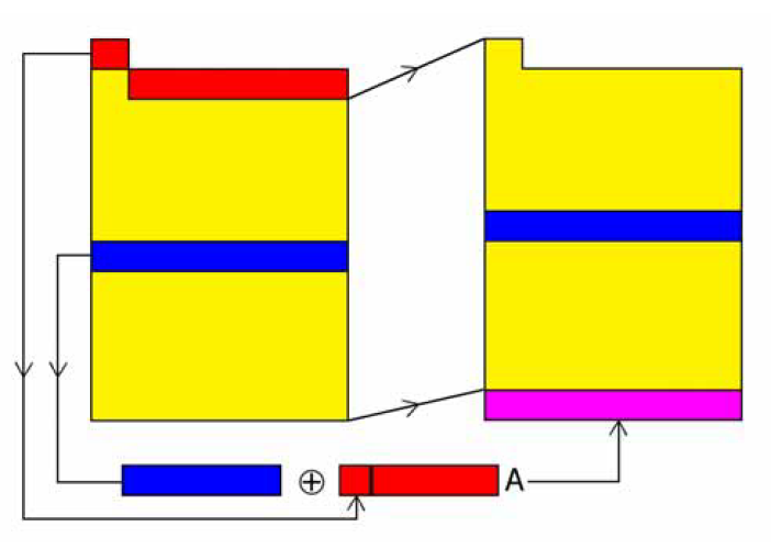 Смена состояния для алгоритма генератора «Вихрь Мерсенна»